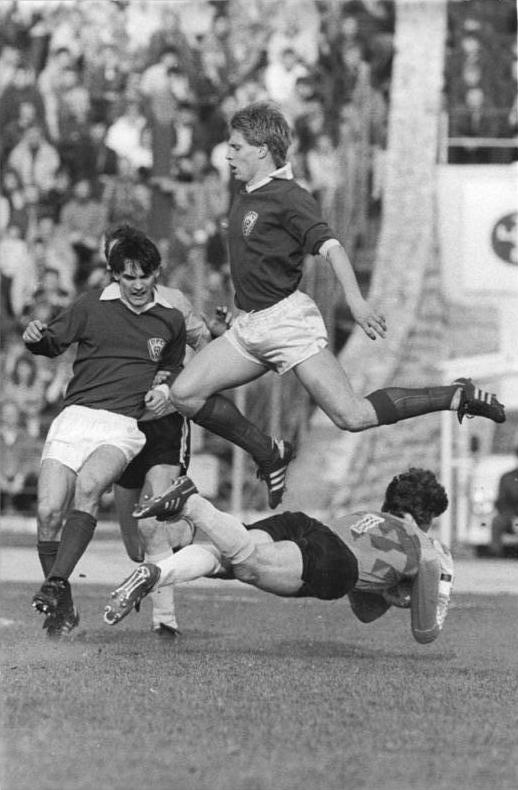 ADN-ZB-Mittelstädt-6.4.88-A-Berlin: Fußball-Oberliga- BFC Dynamo - Dynamo Dresden 1:0 (1:0)- Dresdens Torwart Ronny Teuber sichert den Ball vor den Berlinern Thomas Grether (l.) und Jörg Fügner.